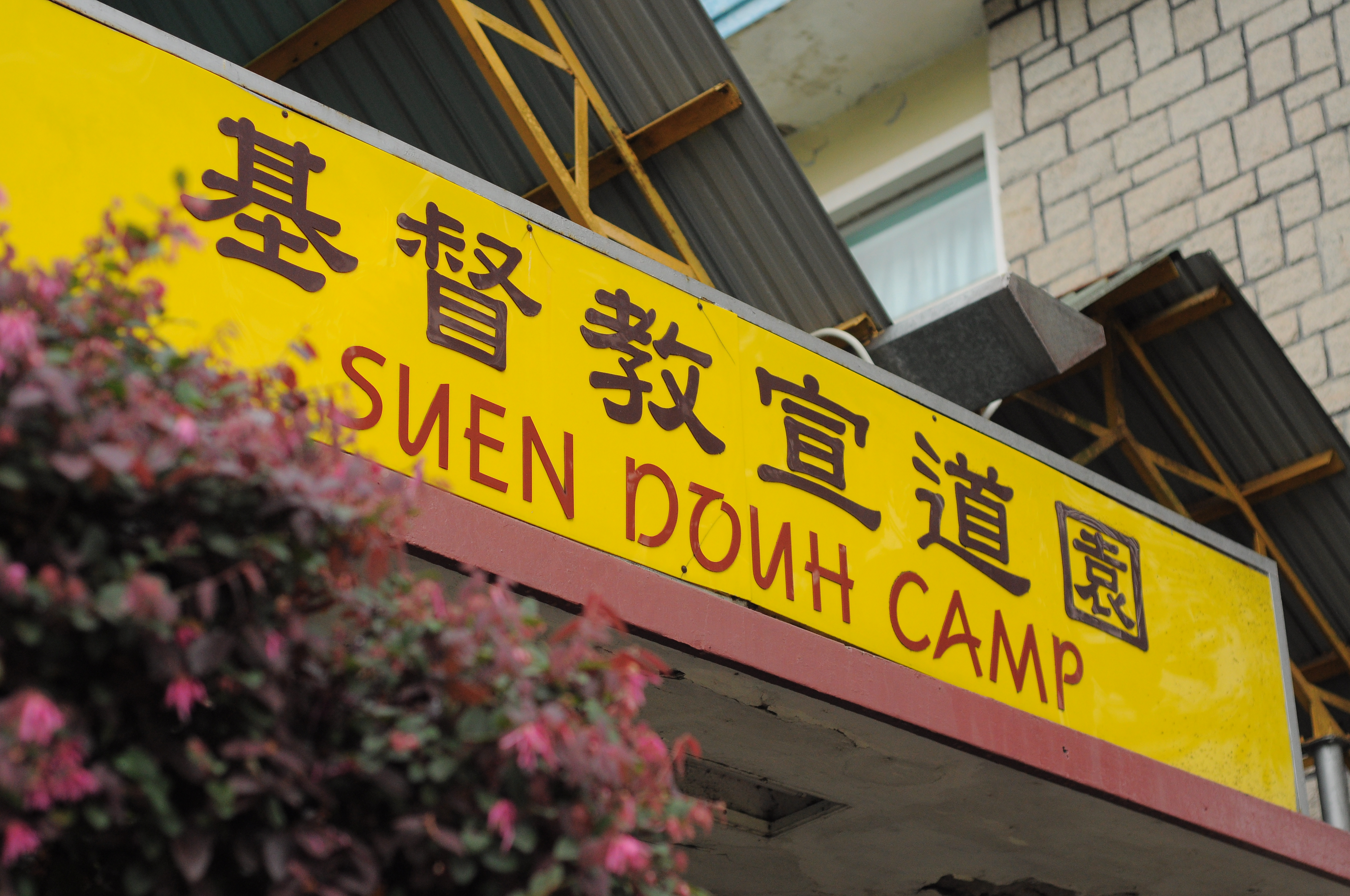 中文（香港）: 宣道園門牌